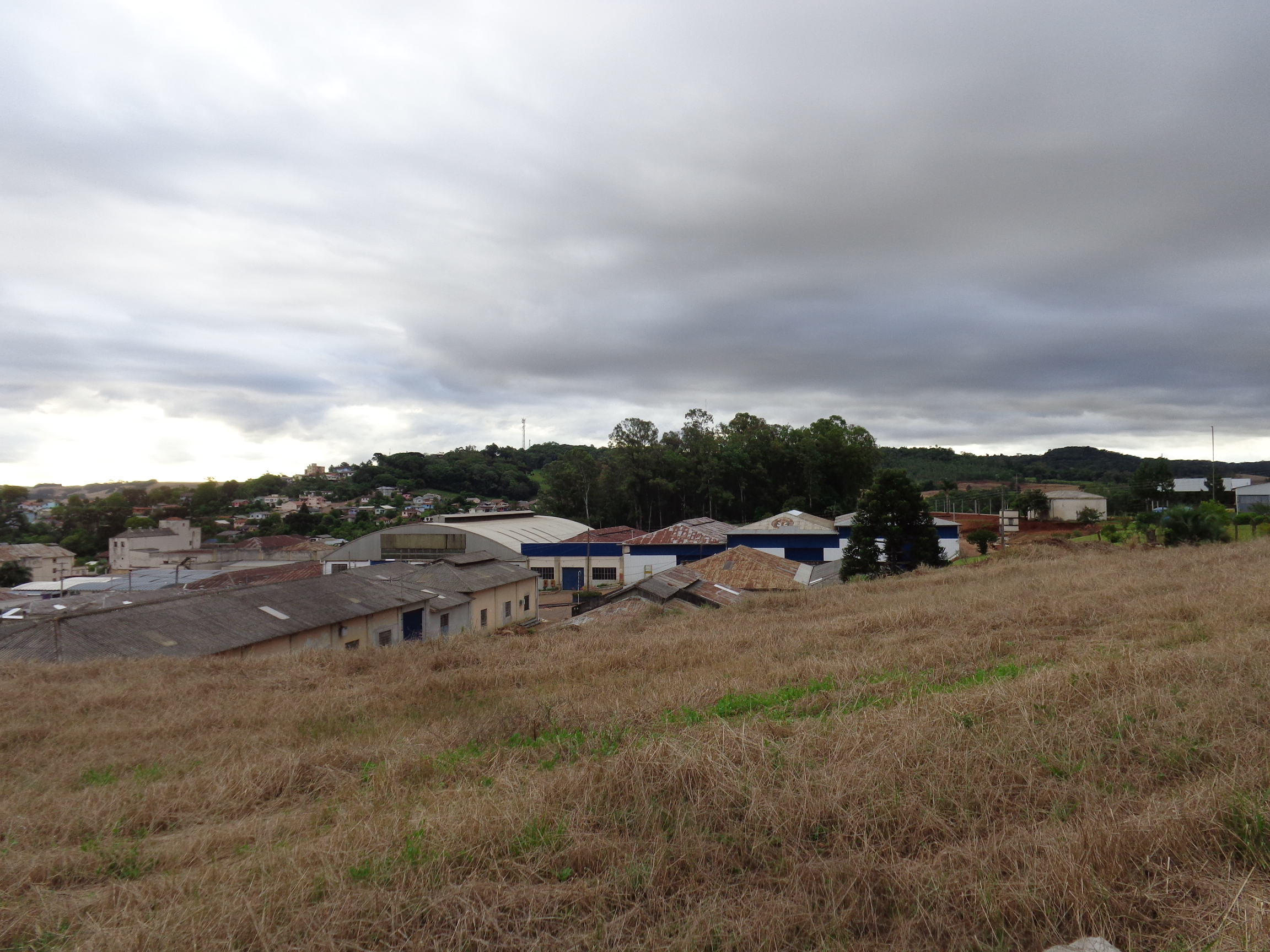 Instalações da antiga Cervejaria Serramalte no município de Getúlio Vargas, Rio Grande do Sul.